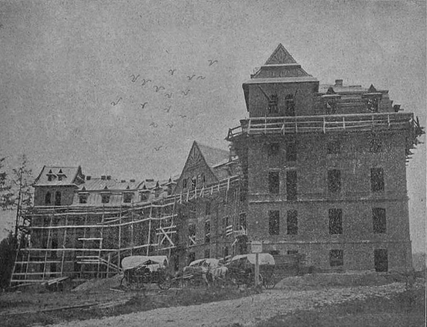 Budowa sanatorium w Zakopanem (1901)